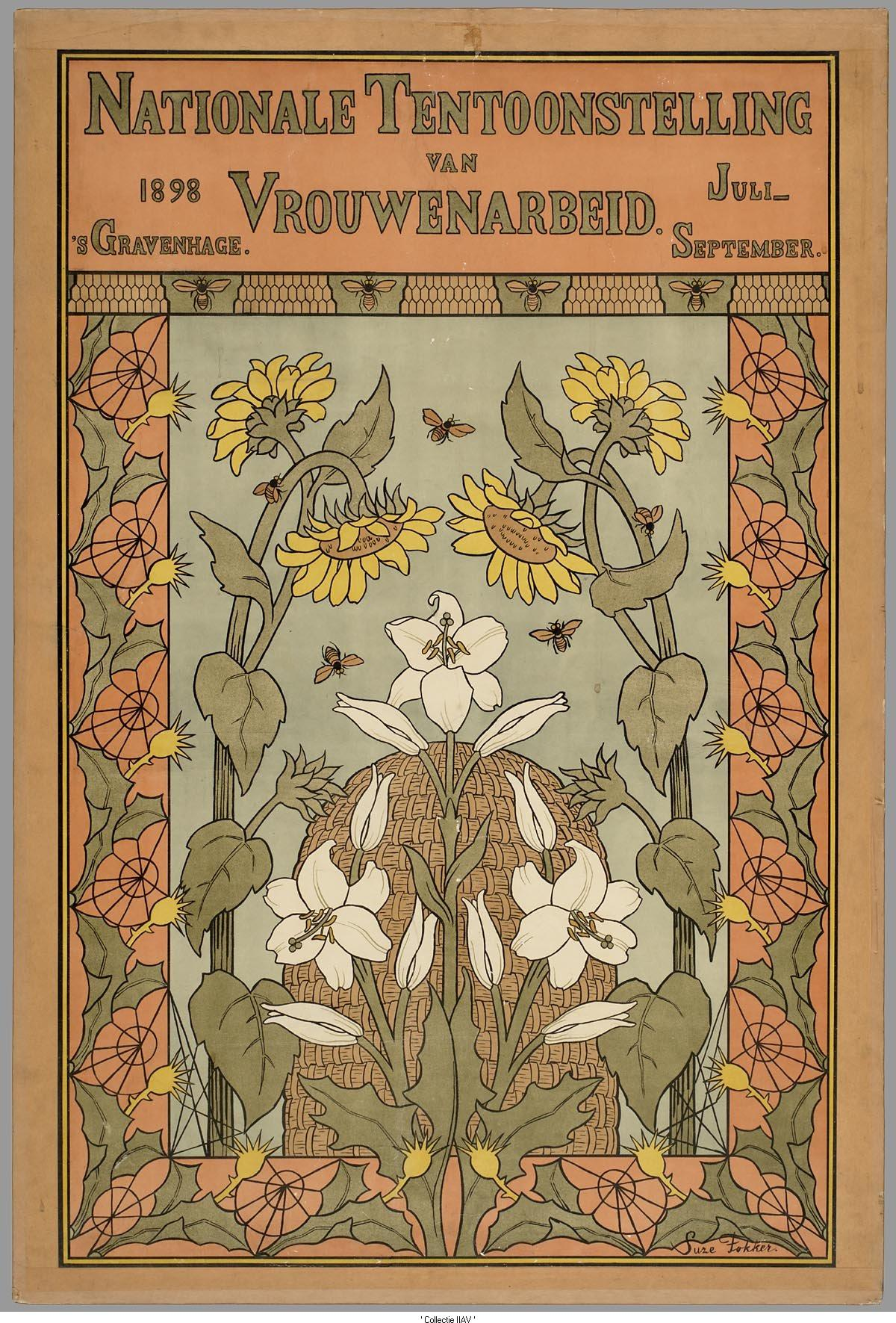 Nationale Tentoonstelling Vrouwenarbeid Den Haag 1898. Ontwerp Suze Fokker. Collectie Aletta Amsterdam